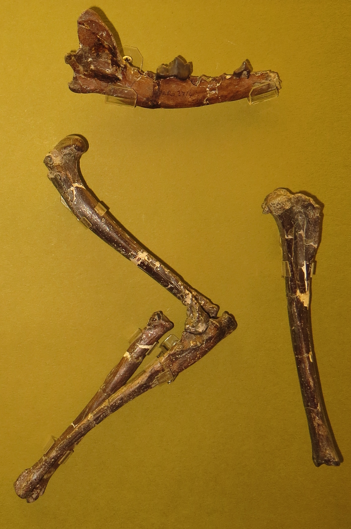 Fossil - took the picture at Museo Scienze Naturali di Faenza